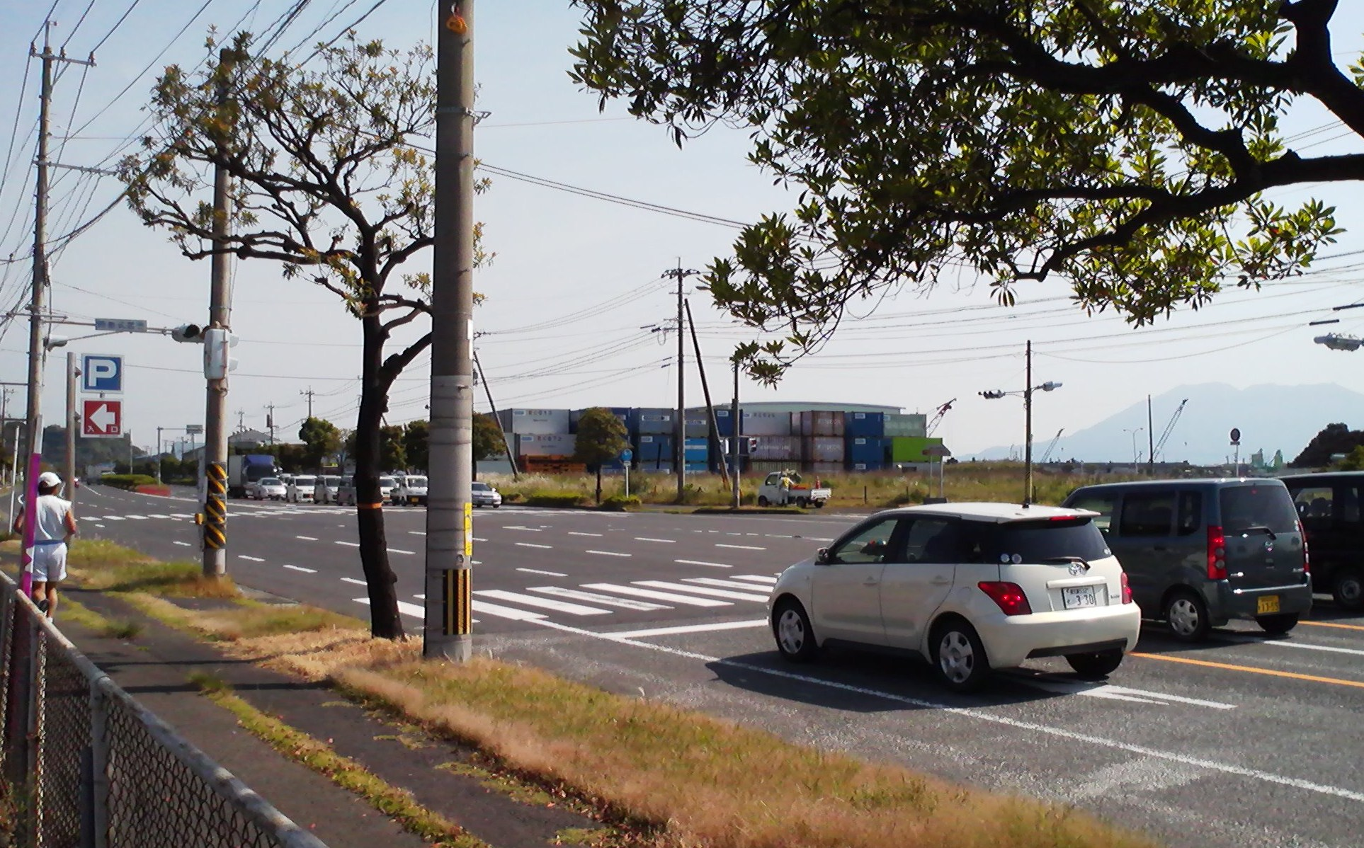 鹿児島県道219号玉取迫鹿児島港線を七ツ島方面から谷山方面を望む